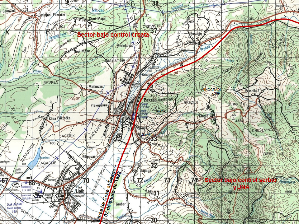 Trazado aproximado de la línea de cese al fuego del 02 de enero de 1991 - Sector Pakrac.